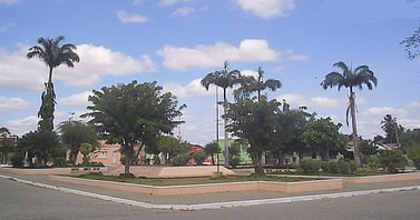 Praça dos Torres, no centro da cidade.